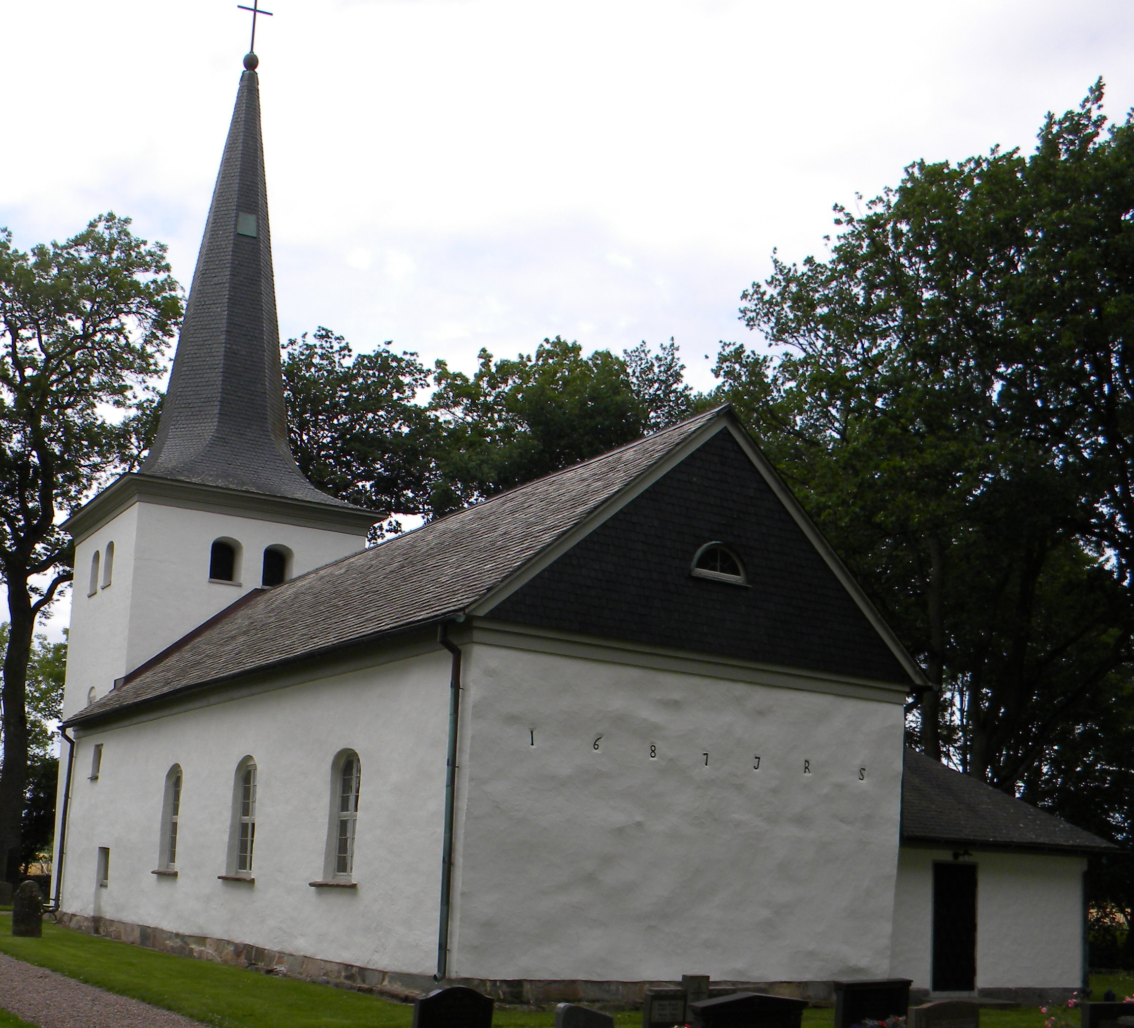 Norra Kedums kyrka